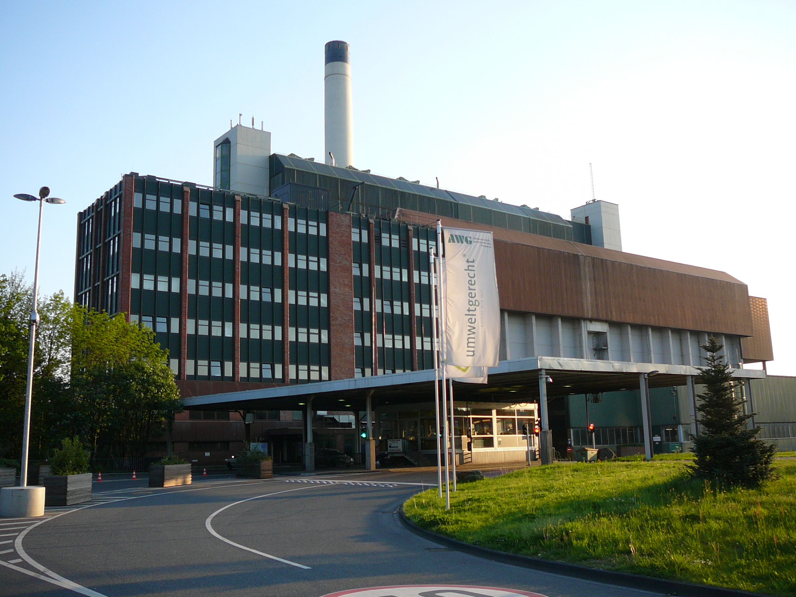 Haltepunkt Wuppertal-Neuenhof, Wuppertal